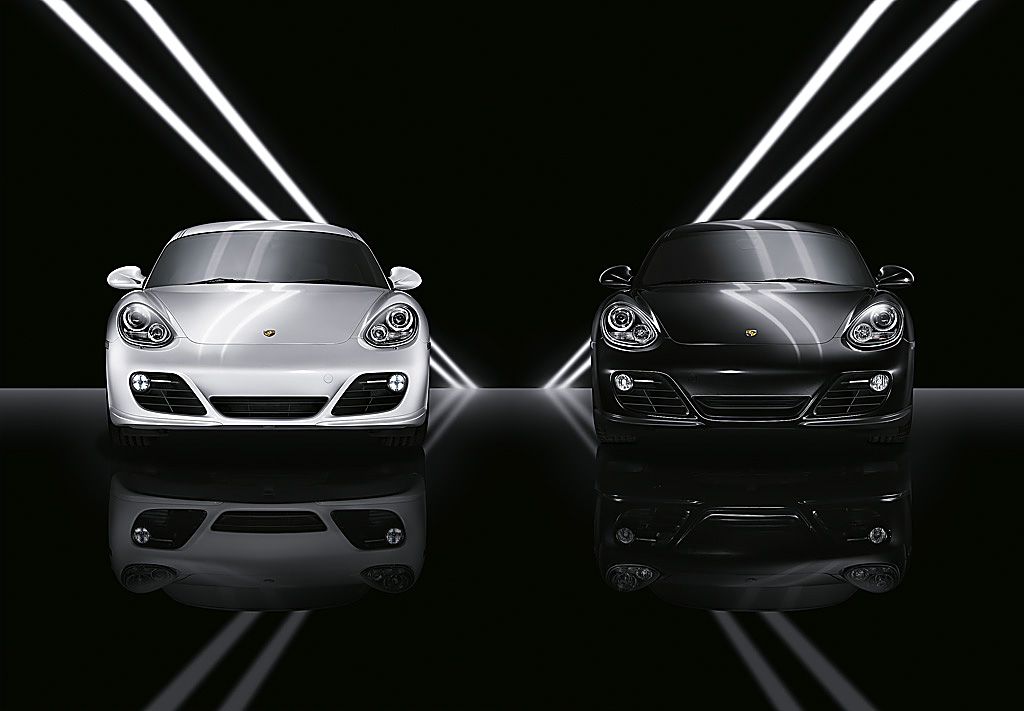 Buch: 911 Love - 50 Jahre Porsche 911